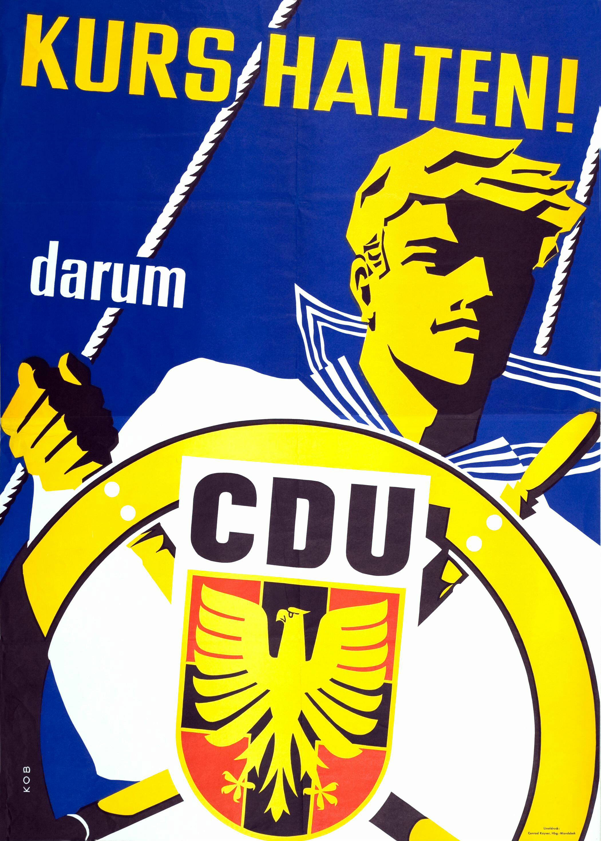 Kurs halten! darum CDUAbbildung:Matrose am Steuerrad mit CDU-Logo - (Graphik)Kommentar:Das Plakat wurde auch im Bundestagswahlkampf 1961 eingesetzt, s. Plakat-Nr. 904.Plakatart:Motiv-/TextplakatKünstler_Grafiker:KOBDrucker_Druckart_Druckort:Linoldruck: Conrad Kayser, Hbg.-WandsbekObjekt-Signatur:10-001: 604Bestand:Plakate zu Bundestagswahlen (10-001)GliederungBestand10-18:Plakate zu Bundestagswahlen (10-001) » Die 3. Bundestagswahl am 15. September 1957 » MotivplakateLizenz:KAS/ACDP 10-001: 604 CC-BY-SA 3.0 DE